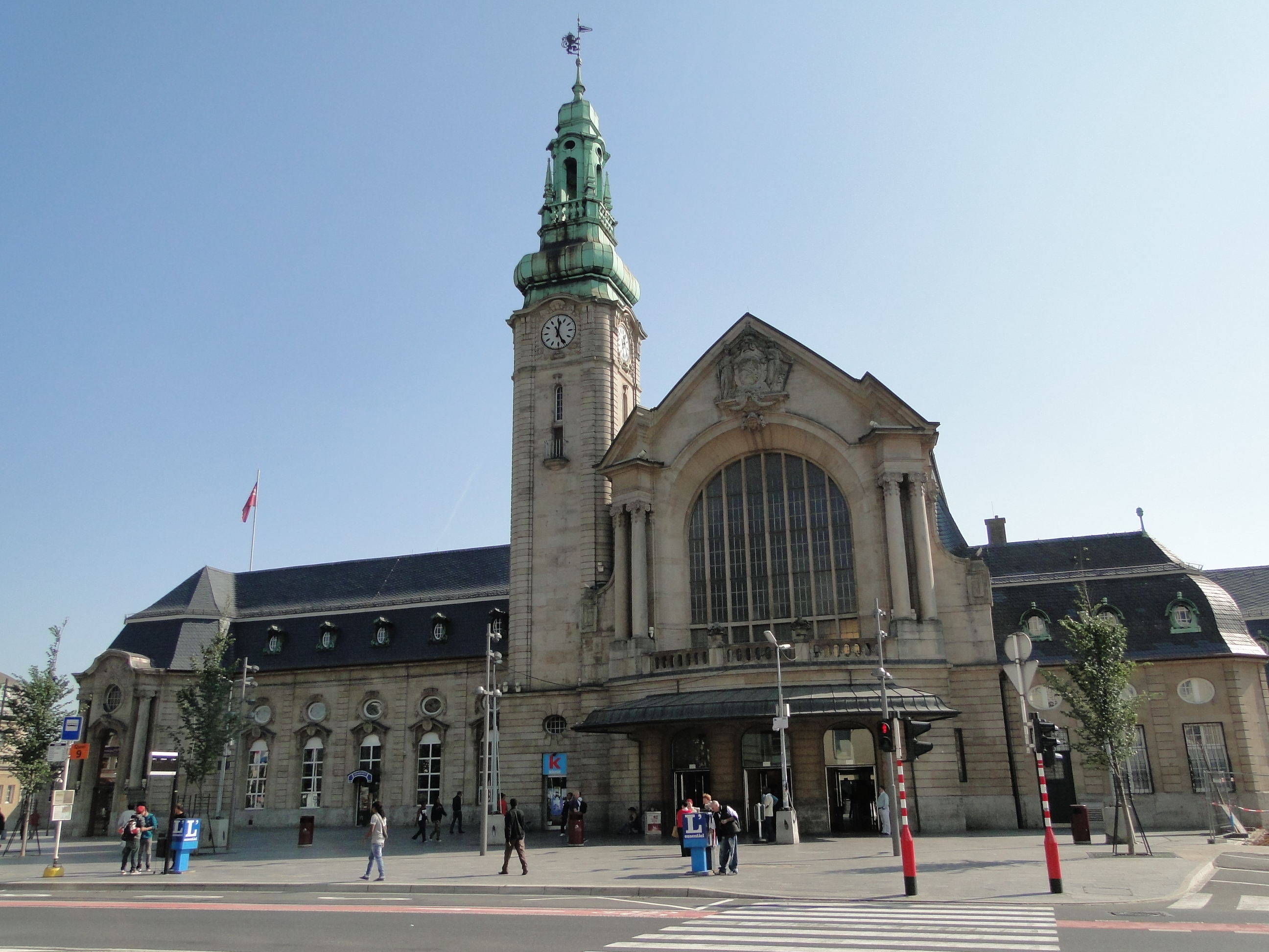 Gare de Luxembourg